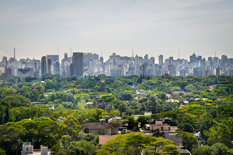 SÃO PAULO, SP, BRASIL, 08-03-2012, 17h00: Skyline da região da avenida paulista.